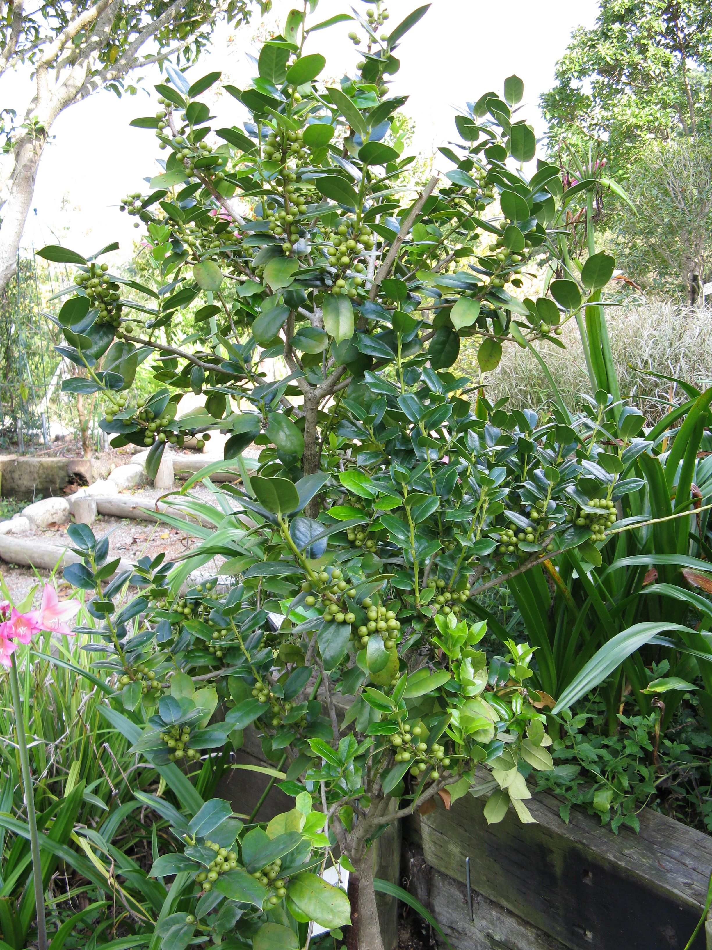 Ilex cornuta